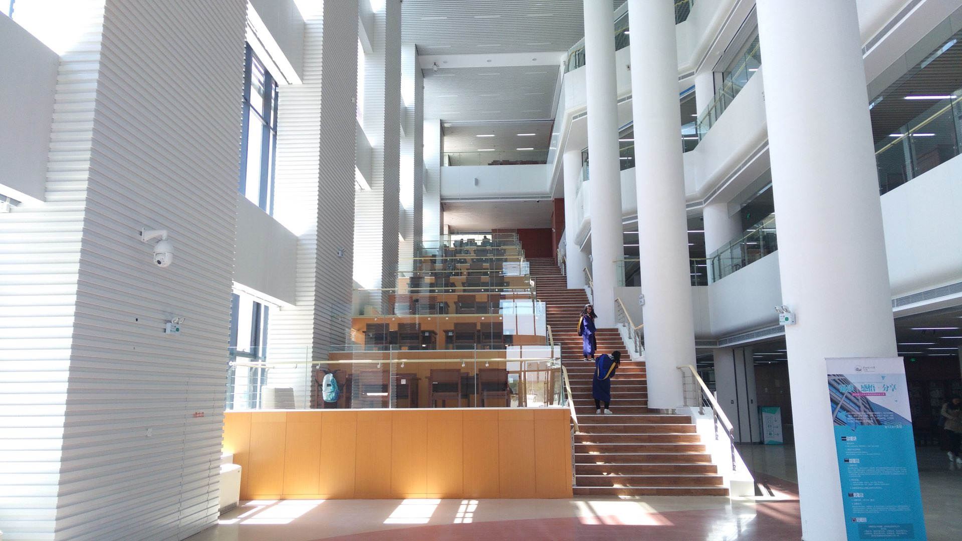 用以编辑维基百科华北理工大学